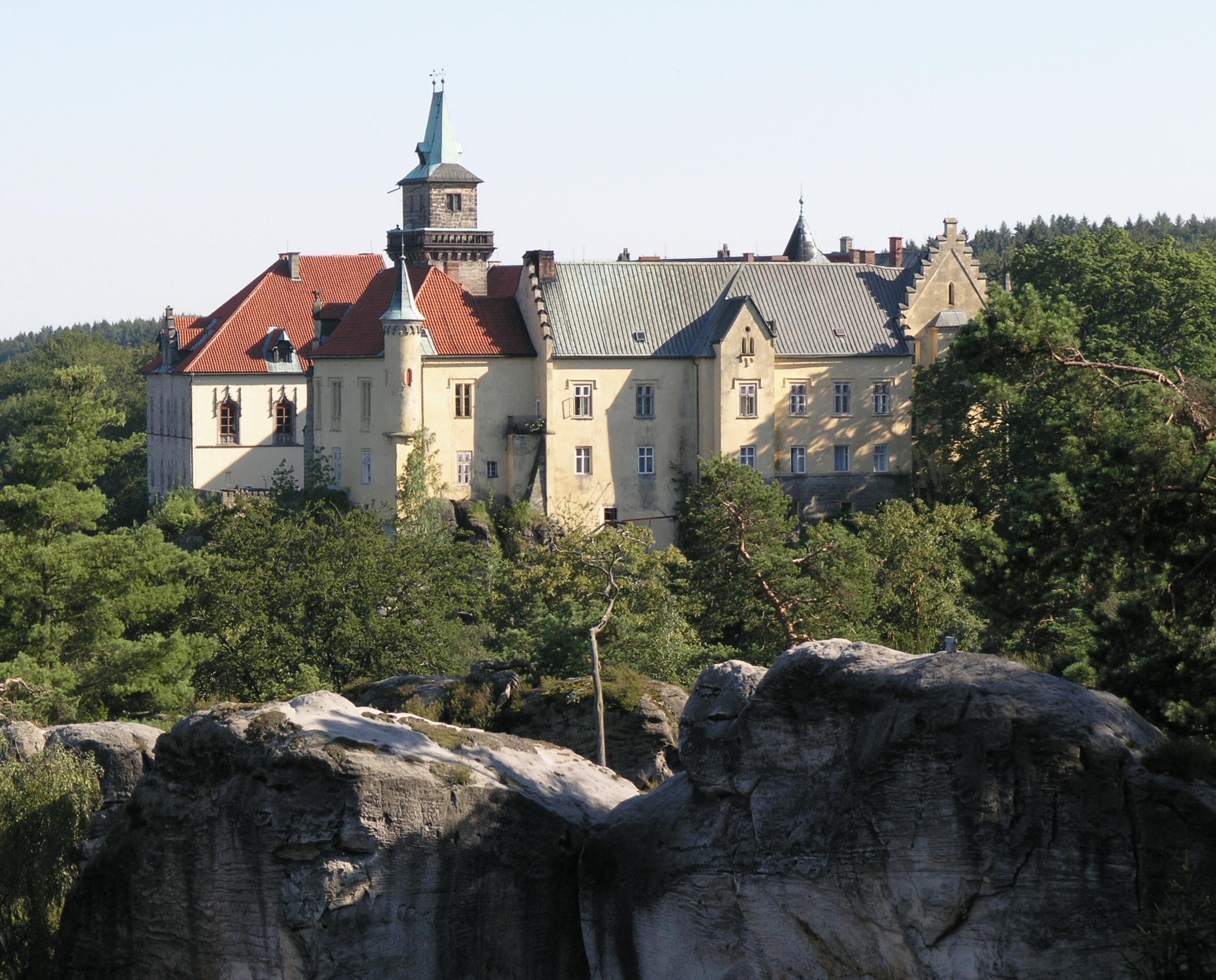 Hruboskalsko